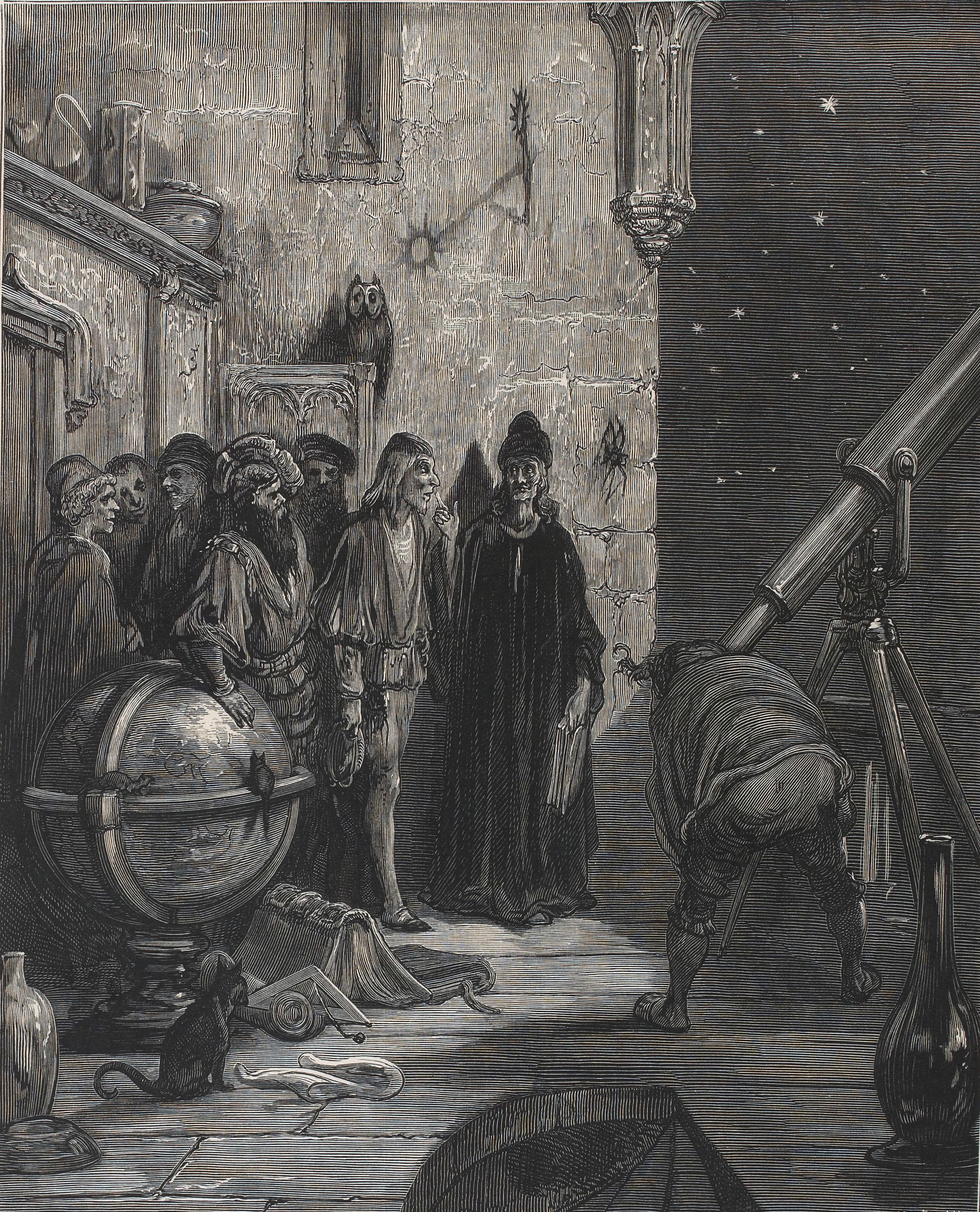 Afin de savoir s'il doit se marier, Panurge consulte Her Trippa, qui, entre autres disciplines divinatoires, exerce l'astrologie. Gravure de Gustave Doré du premier tome de l'édition des Œuvres de Rabelais en 1873 par l'éditeur Garnier Frères.